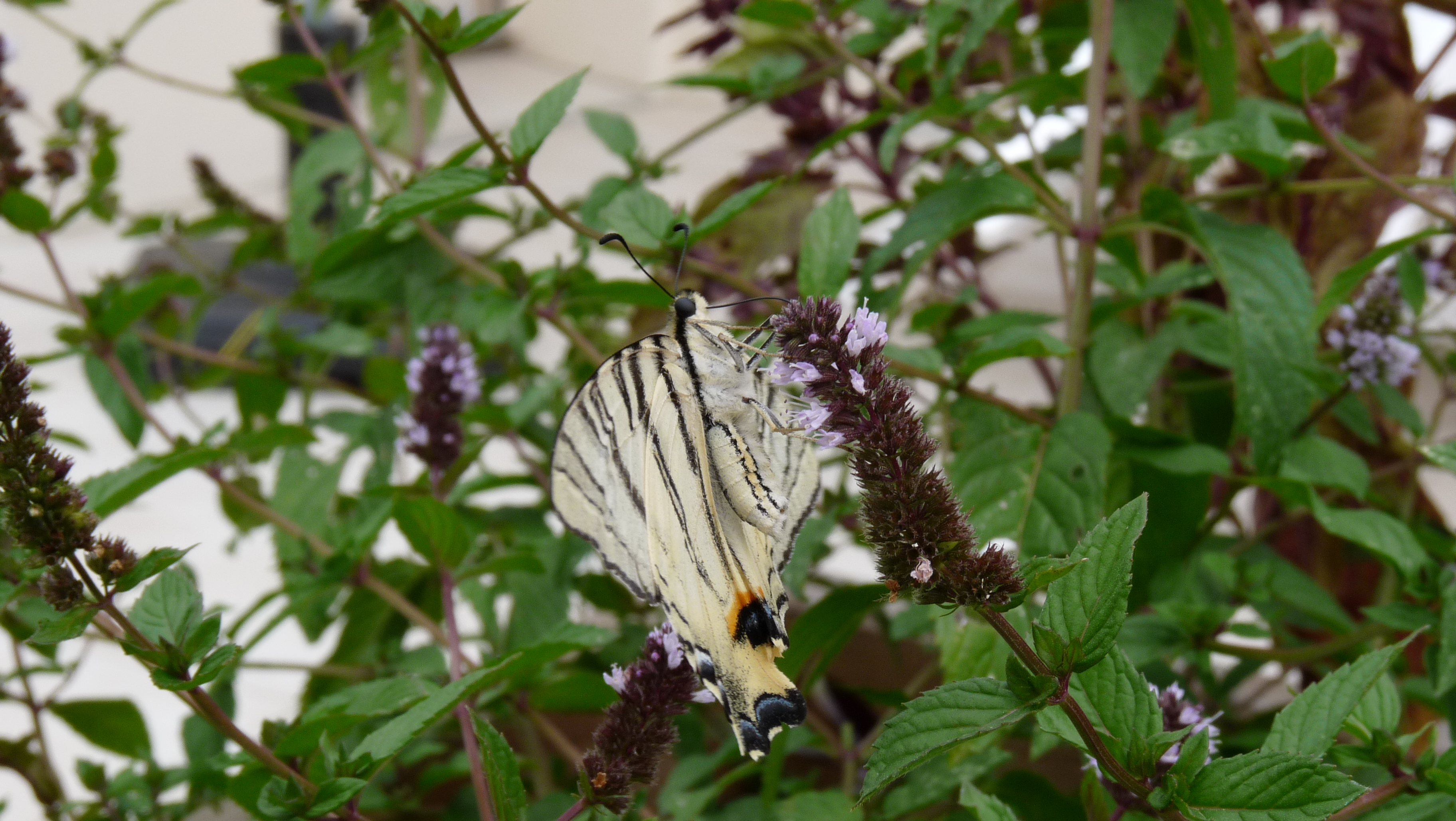 Iphiclides podalirius, suĉanta nektaron de floro de mento, fotita finsomere en la puatua marĉo.